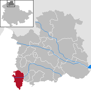 Gemeinde Sollstedt in Thüringen, Landkreis Nordhausen